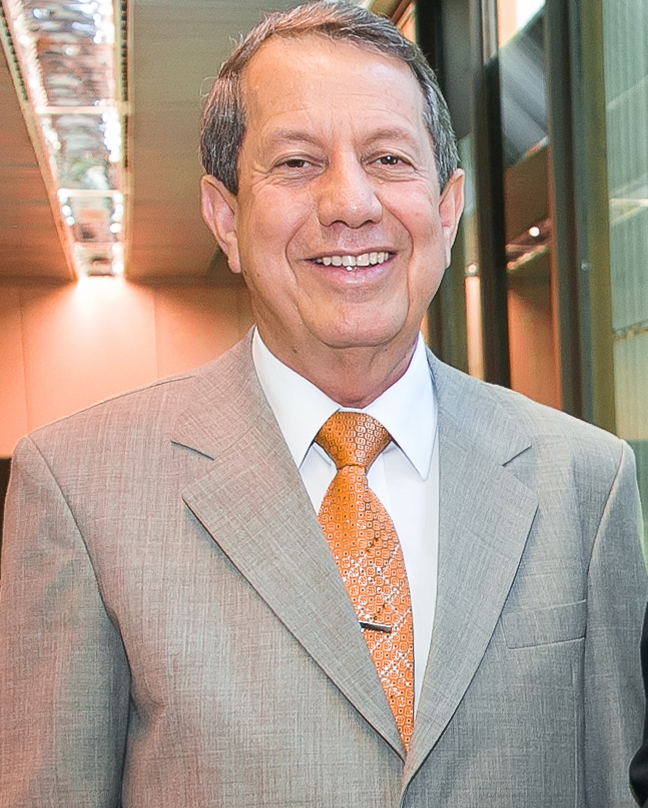 03-02-2015 - Audiência com os deputados Jorge Tadeu Mudalem, Marcos Soares e o Missionário RR Soares. Fotos: Romério Cunha